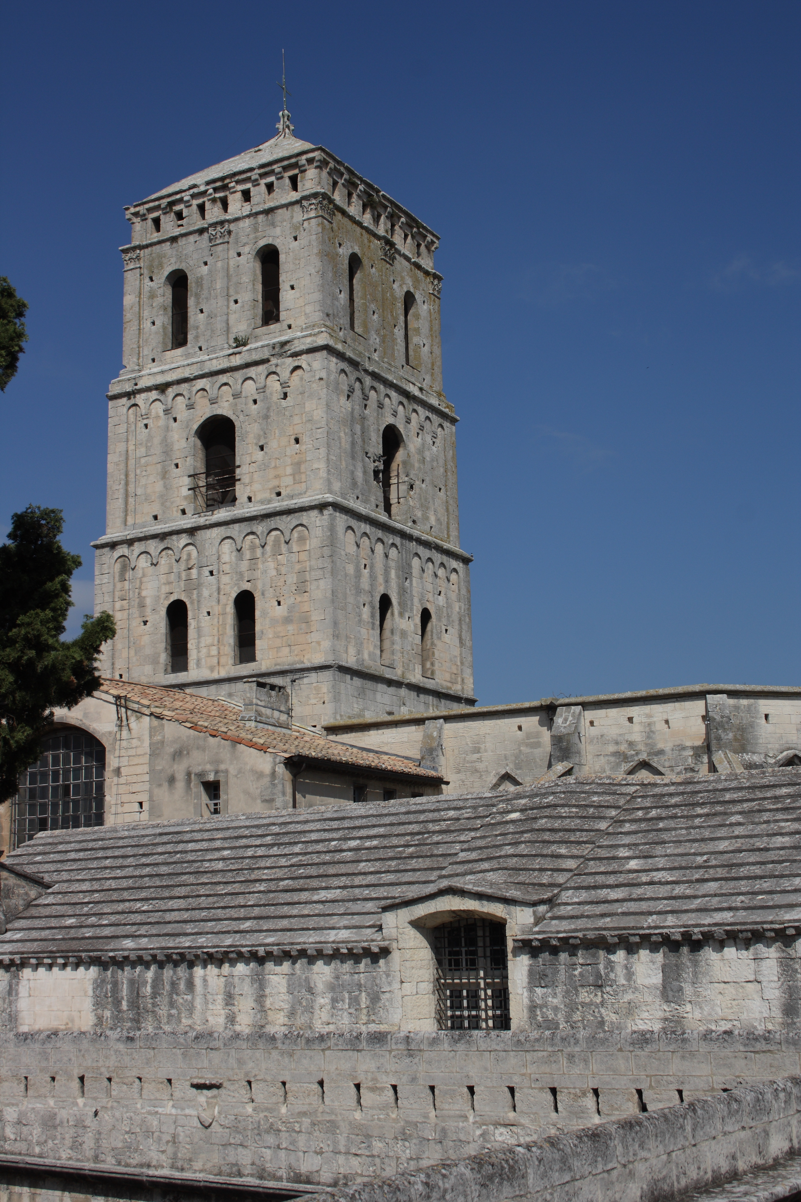 Romanischer Glockenturm der ehemaligen Kathedrale Saint-Trophime in Arles, einer Gemeinde im Département Bouches-du-Rhône in der französischen Region Provence-Alpes-Côte d'Azur